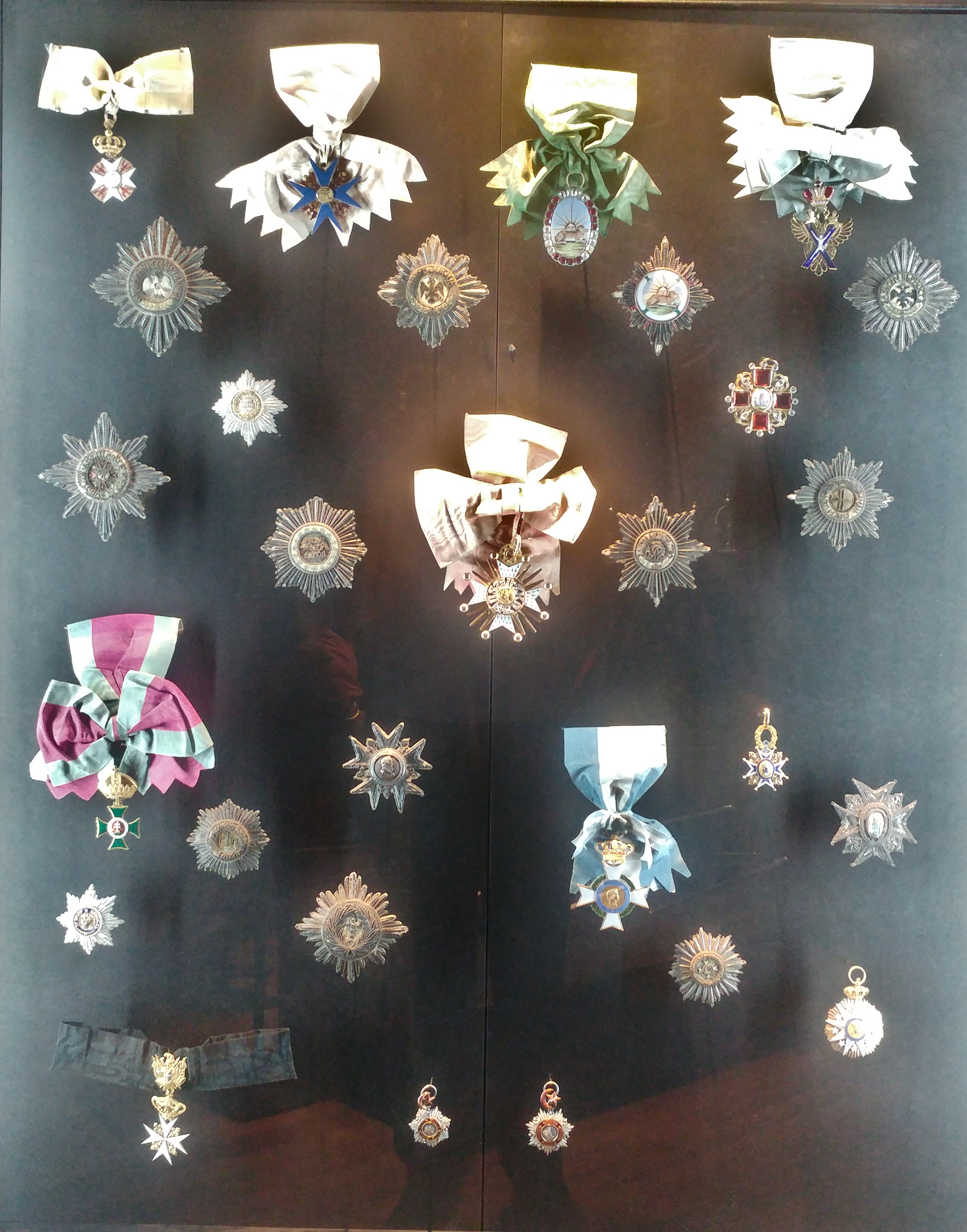 Décoration reçues par Charles-Maurice de Talleyrand-Périgord, château de Valençay